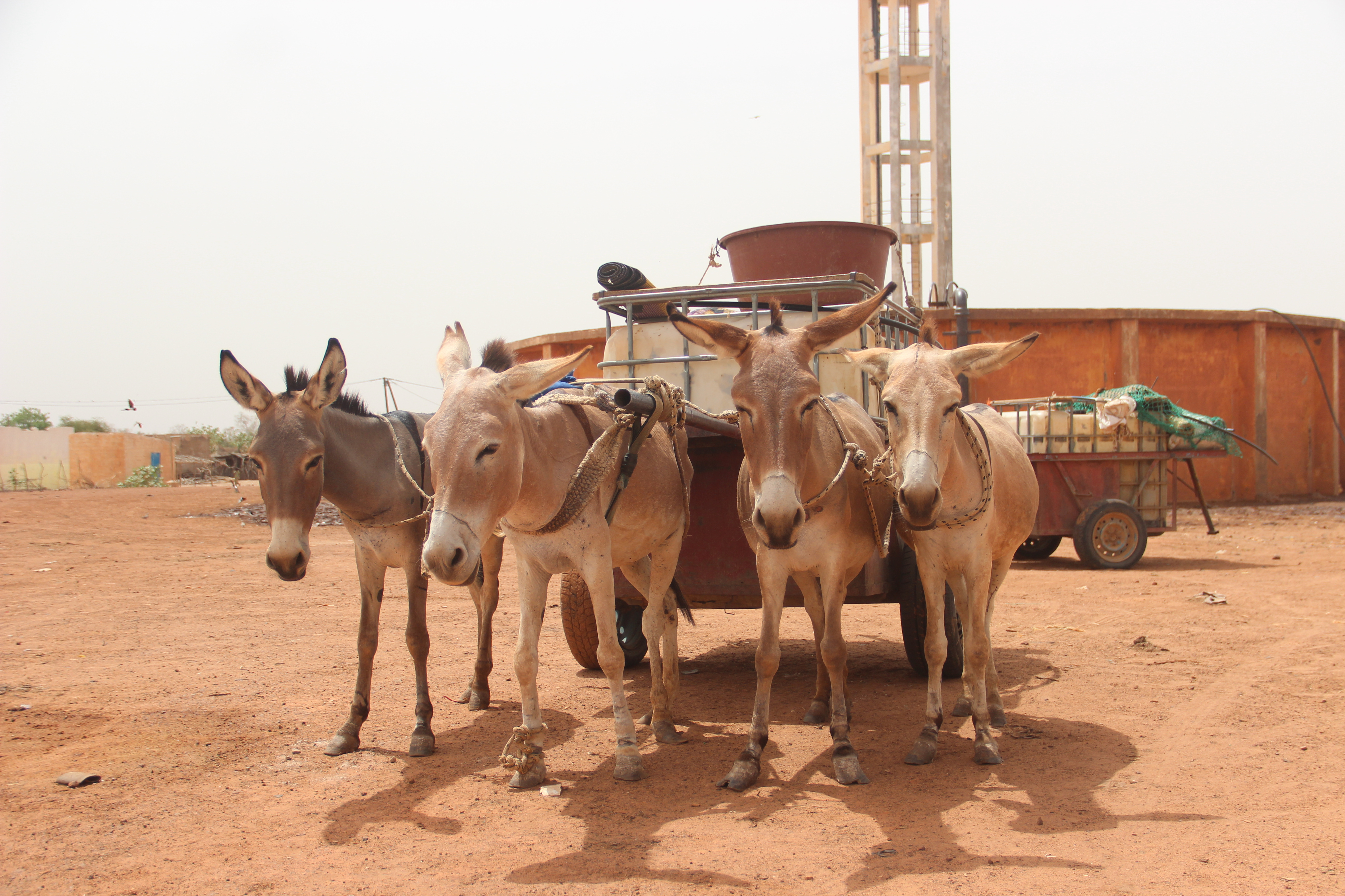 Charrette tirée par des ânes à Younoufere (département de Ranérou-Ferlo, Sénégal). This is an image with the theme "Africa on the Move or Transport" from: Senegal